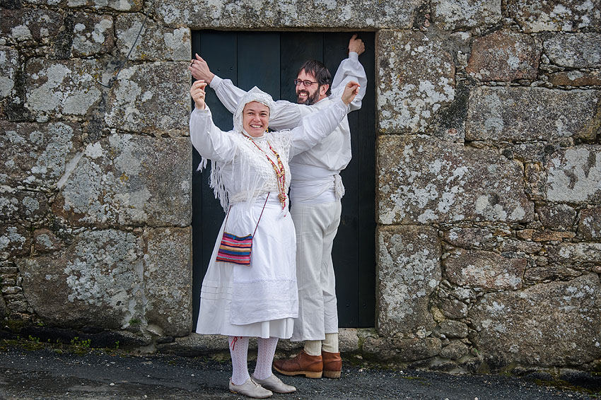 Carolos, personaxes do Entroido de Samede